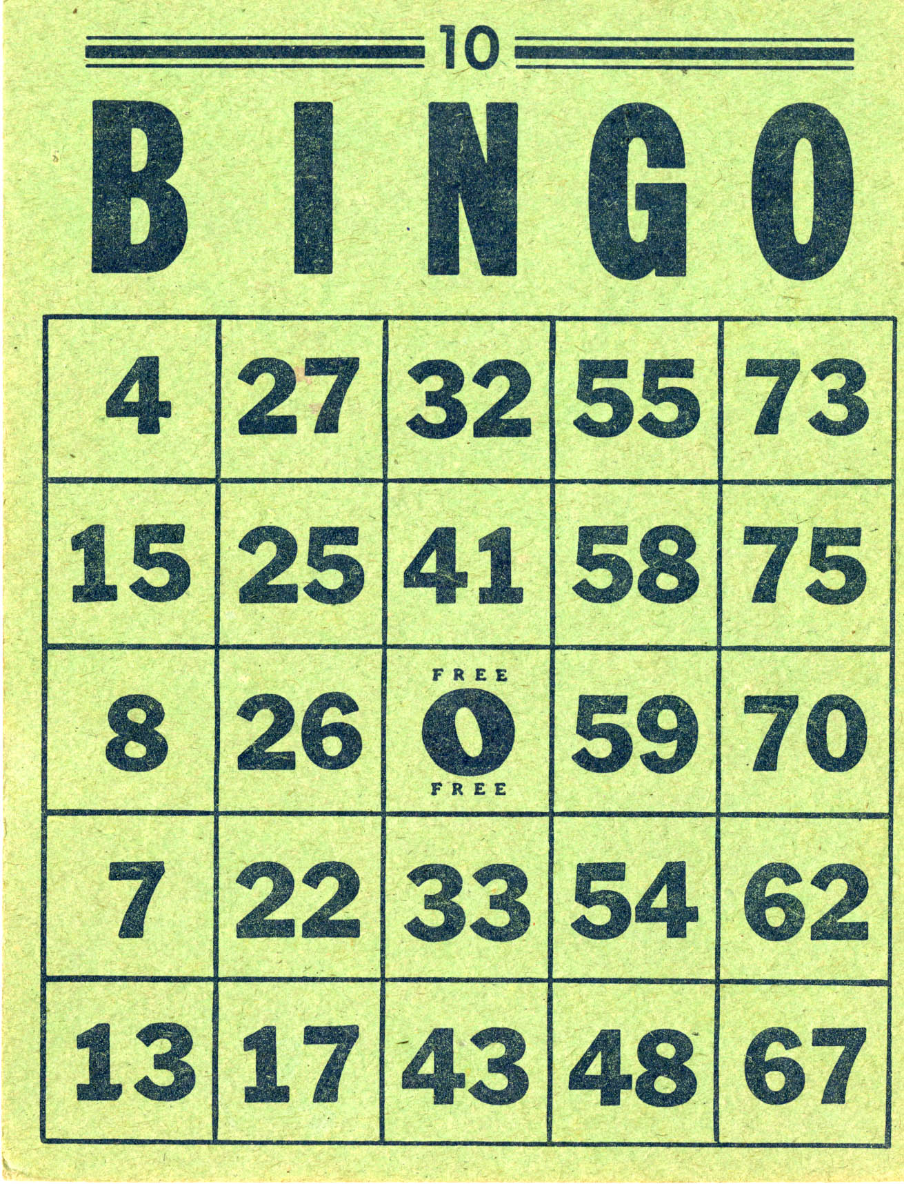 Bingo card.